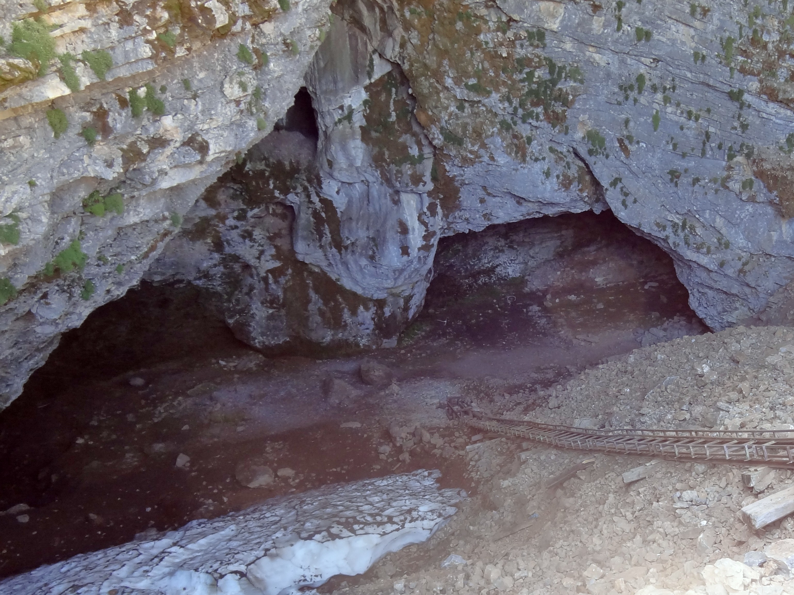 Idäische Grotte an der Nida-Hochebene, Gemeinde Anogia, Regionalbezirk Rethymno, Kreta, Griechenland